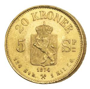 Norwegische 20-Kronen-Münze von 1874 mit Wertangabe in Kronen und Speciedaler..